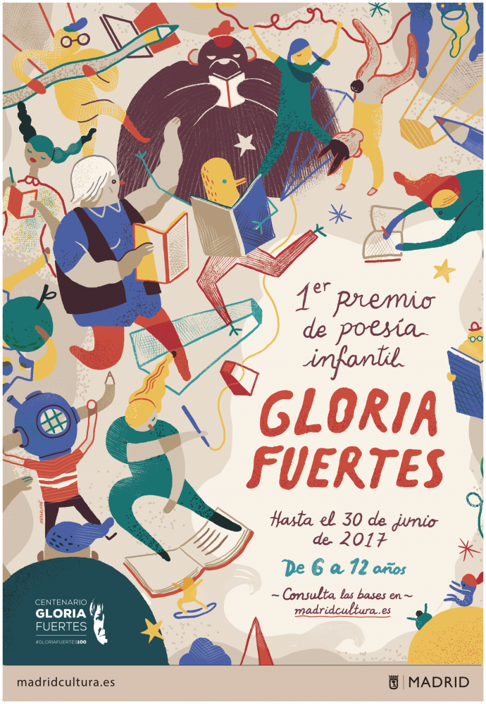 El área de Cultura del Ayuntamiento de Madrid convoca el primer Premio de Poesía Infantil Gloria Fuertes. Esta iniciativa se enmarca dentro de los actos que celebra el Ayuntamiento para conmemorar el centenario del nacimiento de la famosa poeta. El premio tiene como objetivo incentivar la creatividad y apoyar el fomento de la lectura entre los más pequeños.